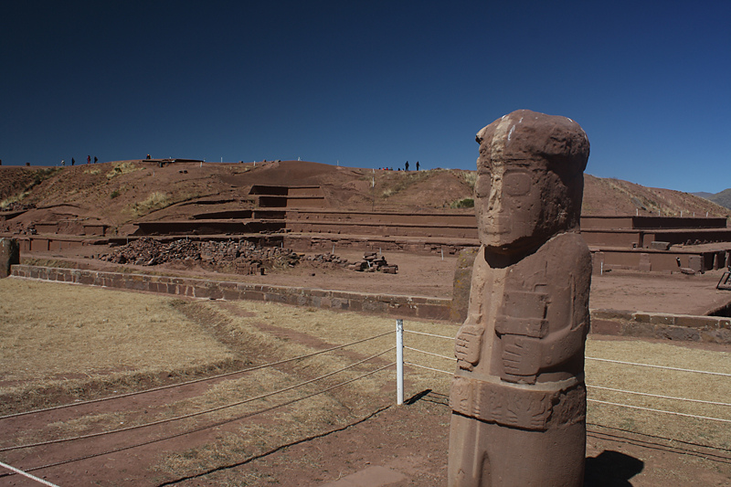 vista del monolito Fraile con la pirámide de Akapana al fondo en el Reciento arqueológico de Tiwanaku, Bolivia.